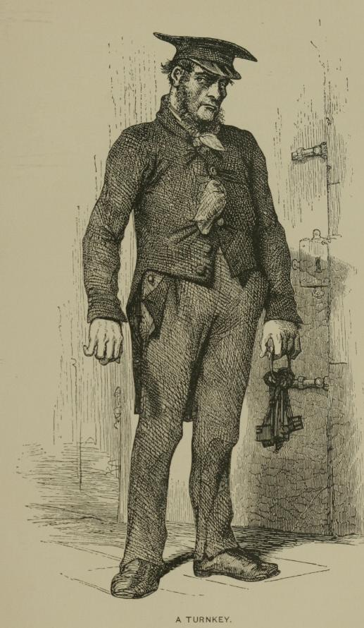 Un Gardien de prison